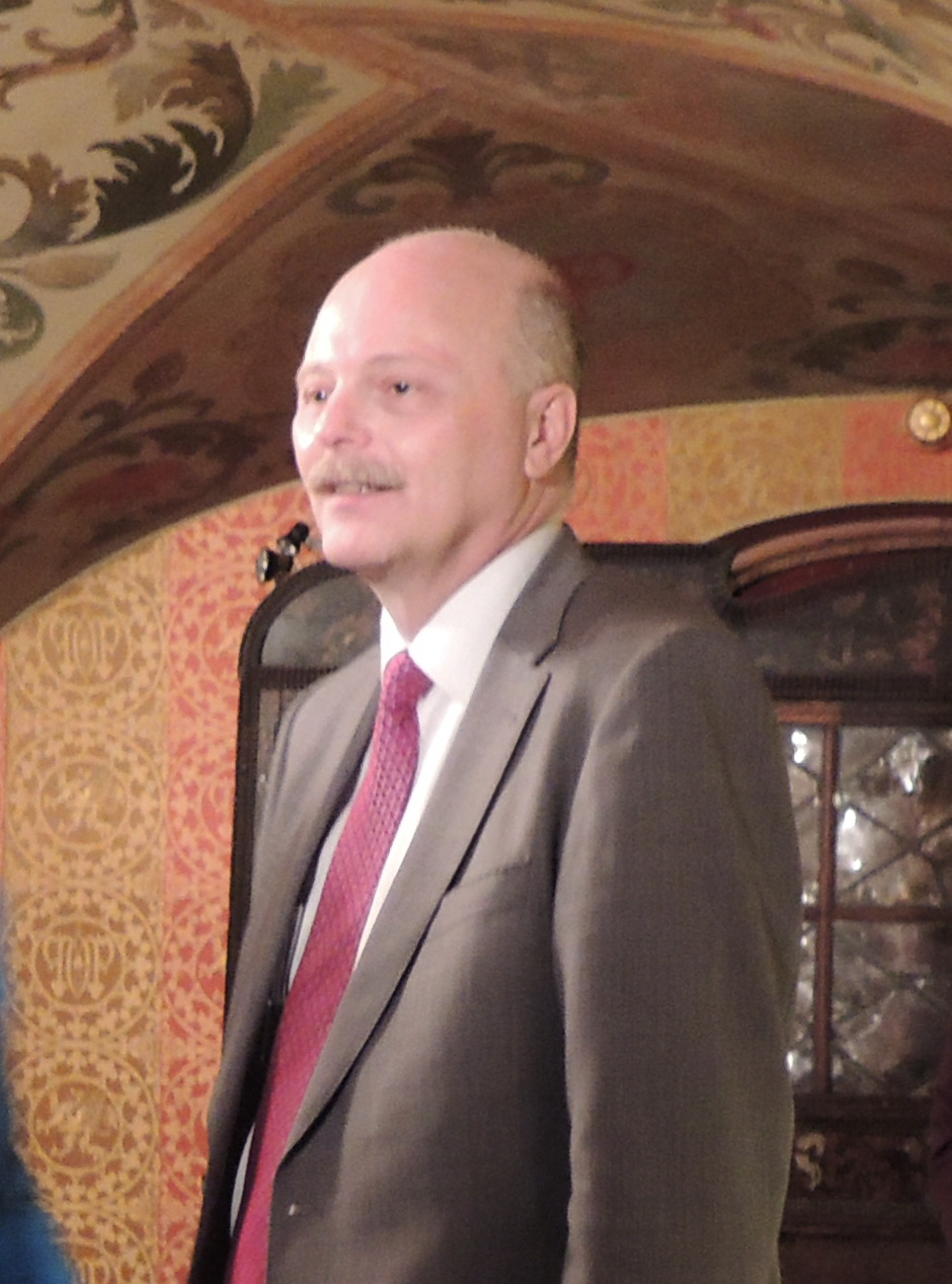 Paul Edward Kulikovsky